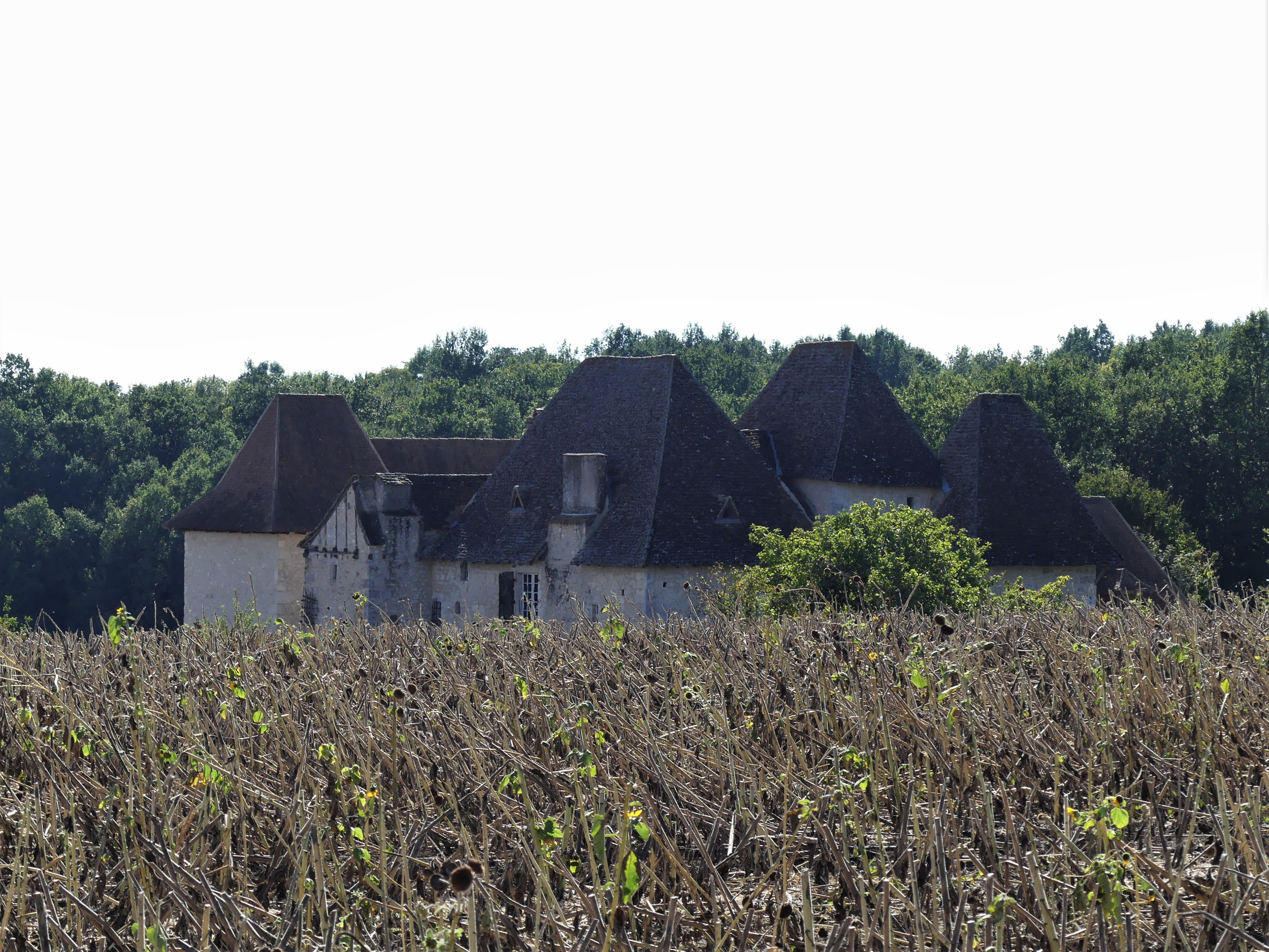 Les toits du manoir de l'Aubespin, Monsaguel, Dordogne, France.